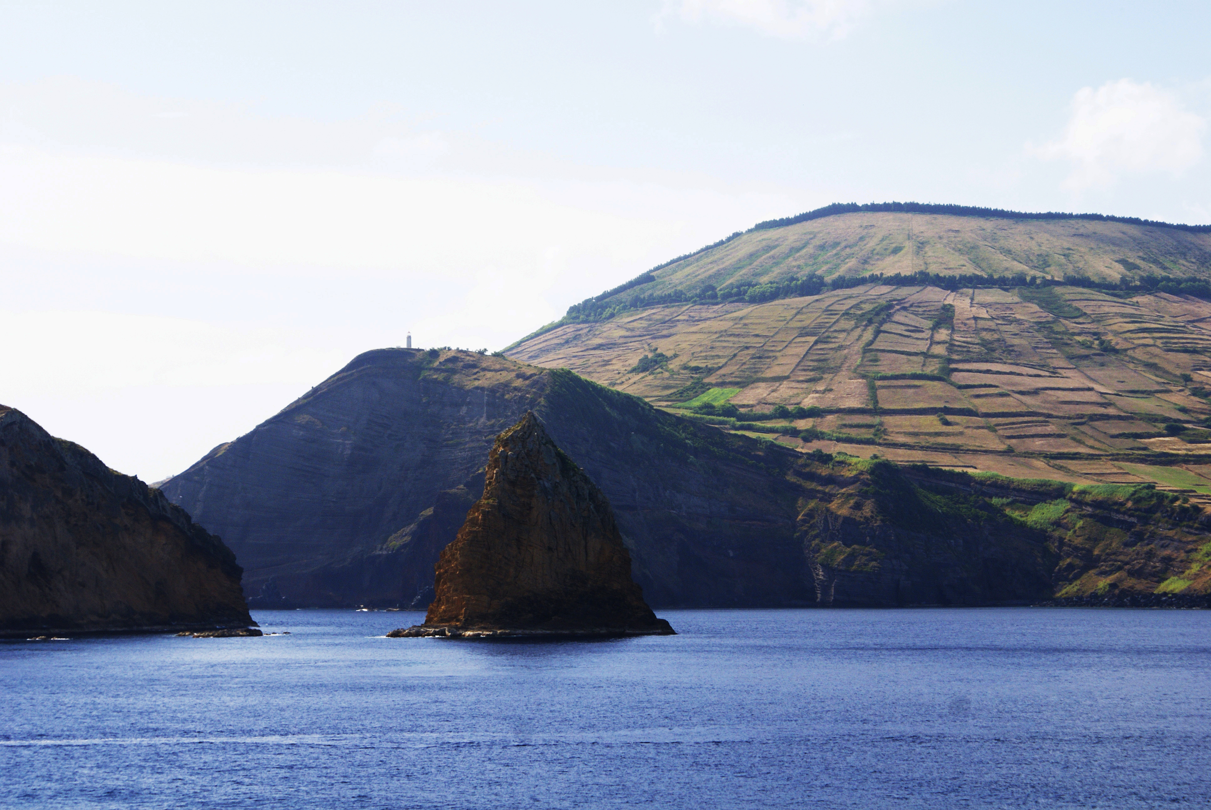 Ponta da Restinga, Santa Cruz da Graciosa, Açores, Portugal